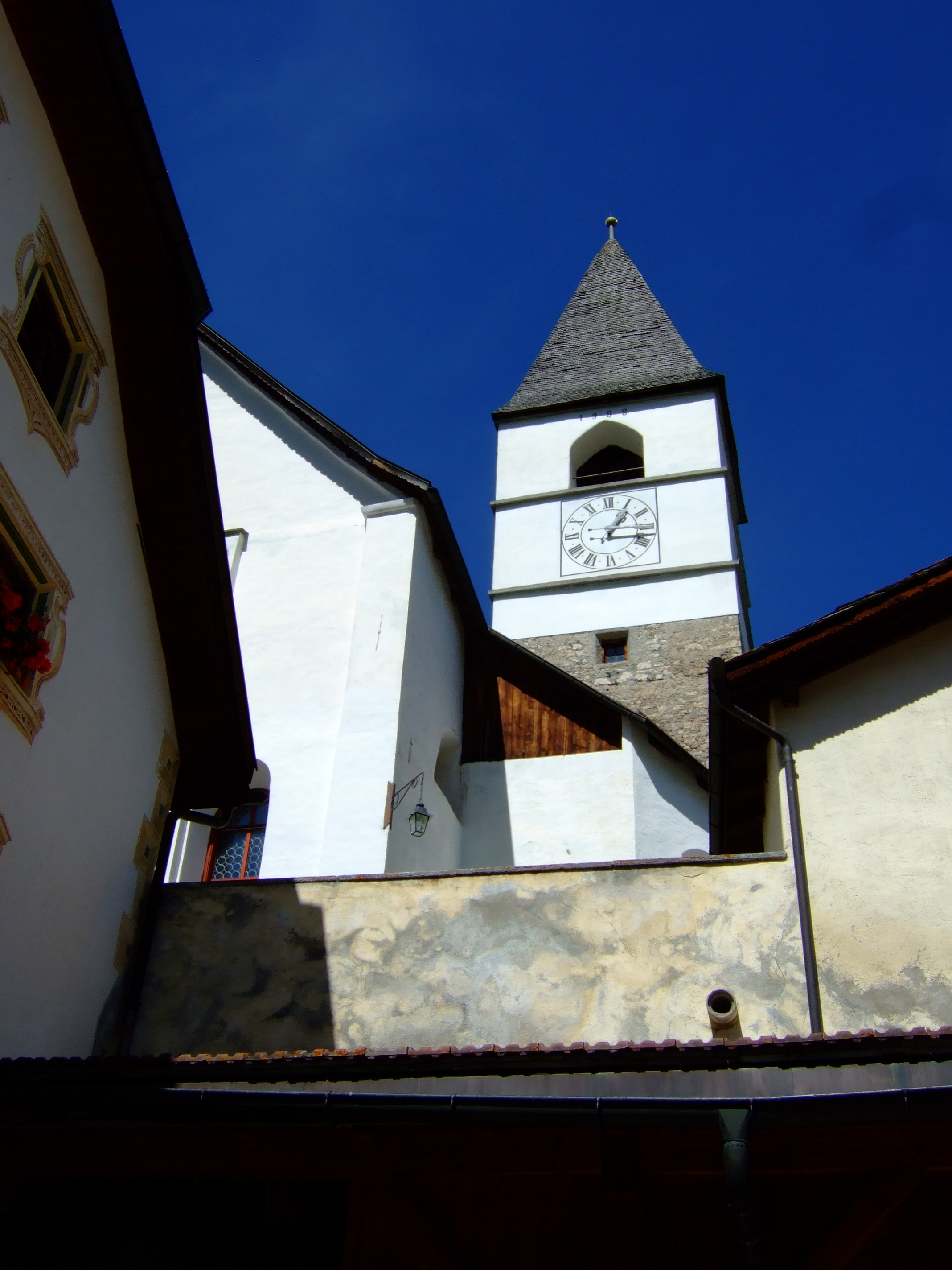 Kirche von Tarasp Fontana, Unterengadin, Schweiz